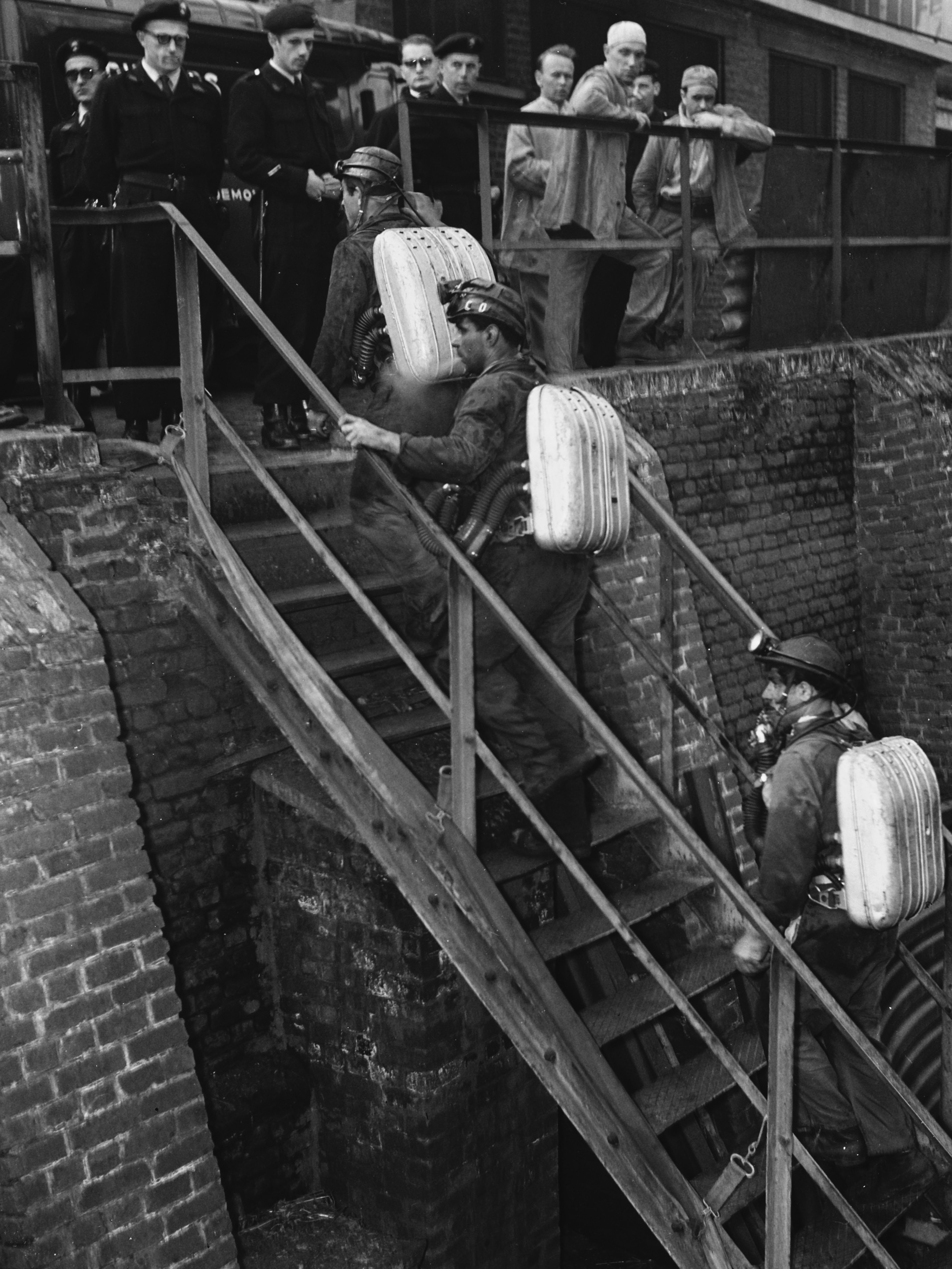 Mijnramp Bois du Caizier , Marcinelle Belgie. Redders met zuurstofapparaten 9 augustus 1956